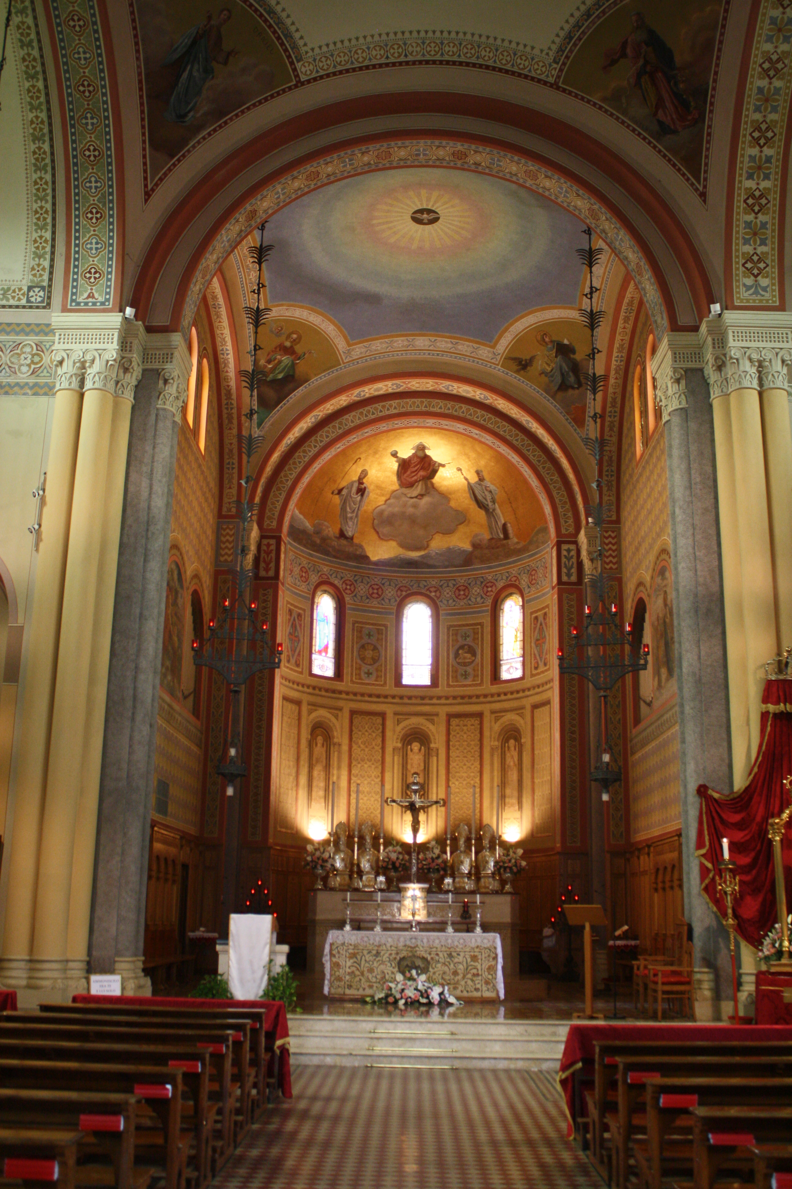 Interno della chiesa del Santissimo Redentore a Cernobbio This is a photo of a monument which is part of cultural heritage of Italy.